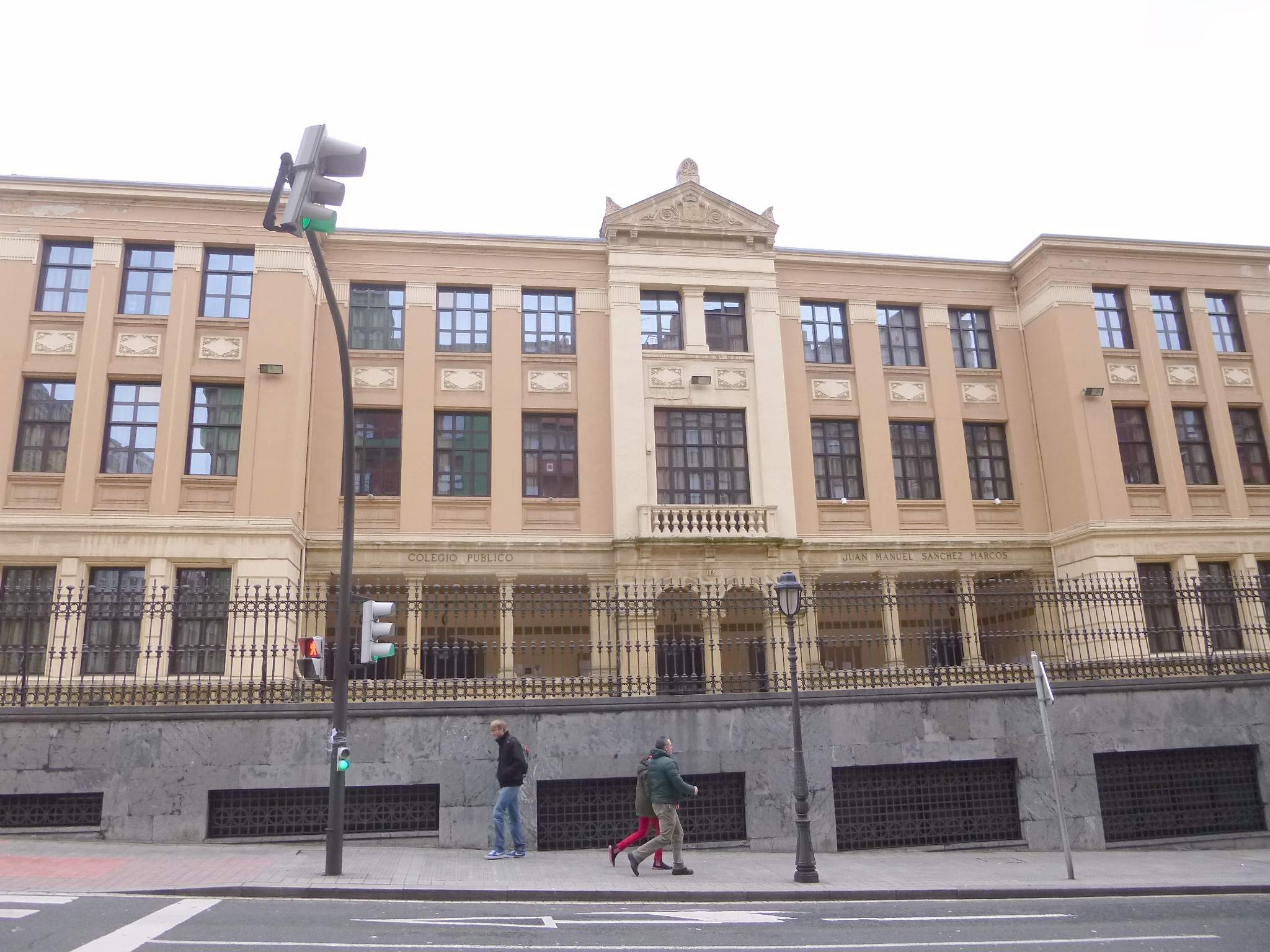 Bilbao - Colegio Público Juan Manuel Sánchez Marcos